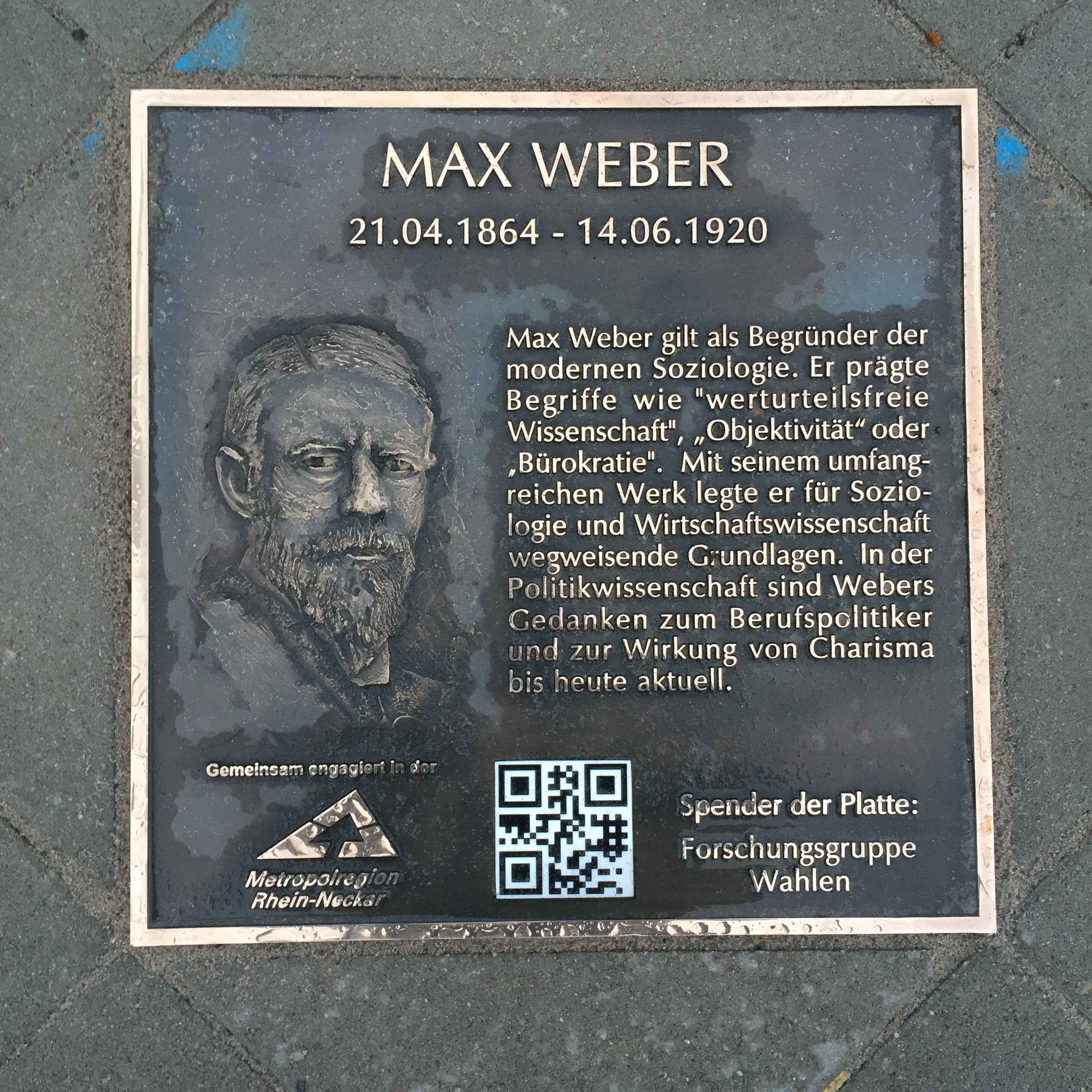 Kurpfälzer Meile der Innovationen. Plakette Max Weber